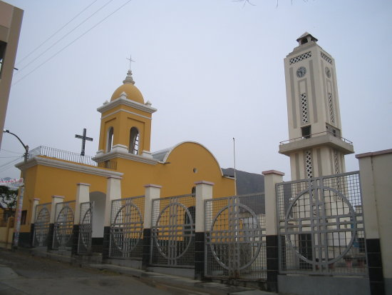 Iglesia del Distrito de Simbal — La Libertad region, Perú.